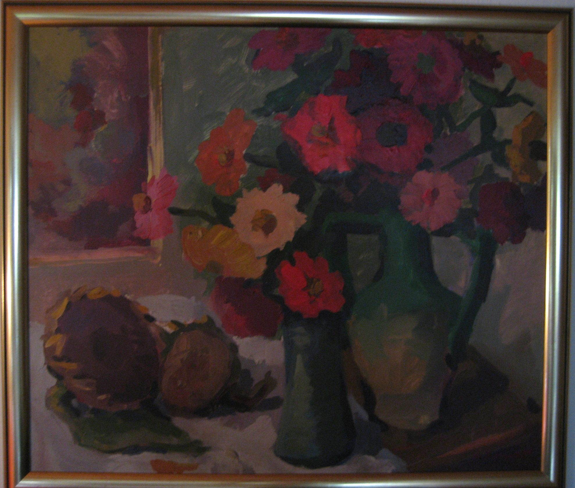 Still life